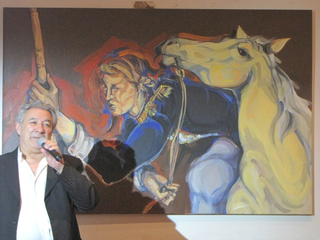 Inauguración en del MURAL de JUANA AZURDUY en el "Instituto Nacional de Revisionismo Histórico Argentino e Iberoamericano "Manuel Dorrego" (4-12-2014)